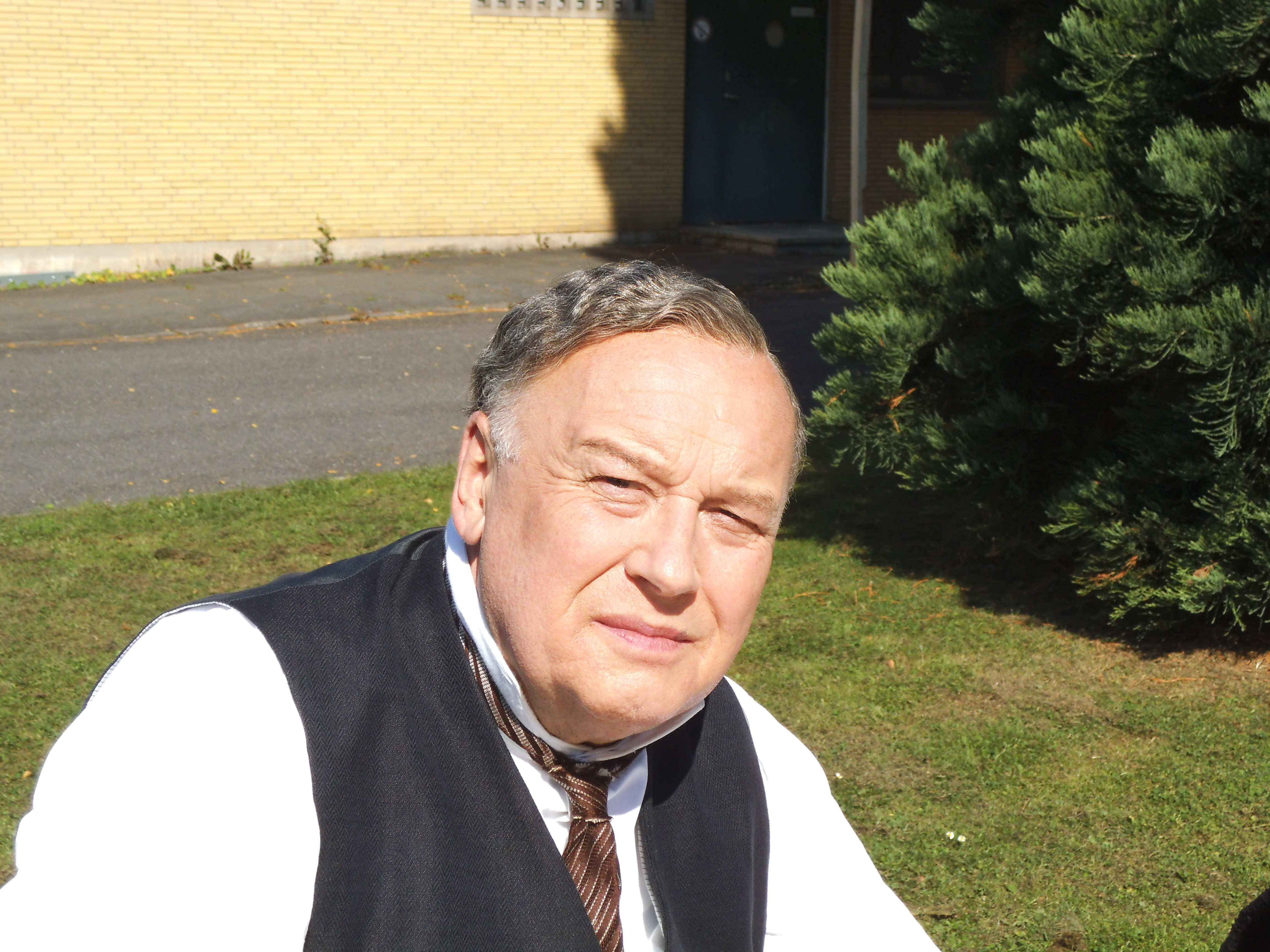 Schauspieler Thomas Thieme am 17. September 2014 in Düren.